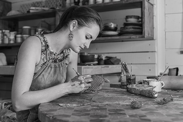 detallado de la cerámica